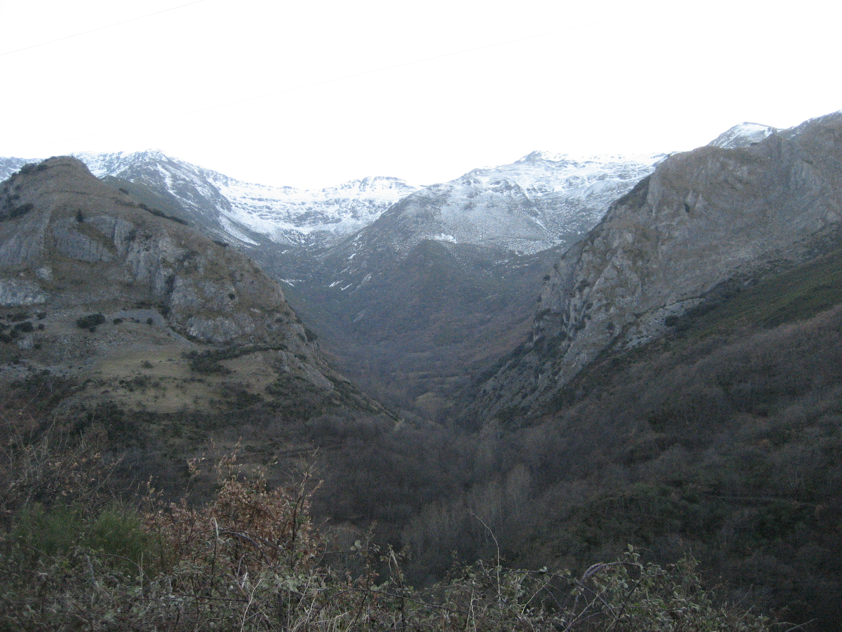 Valle del Silencio (El Bierzo, León, España)